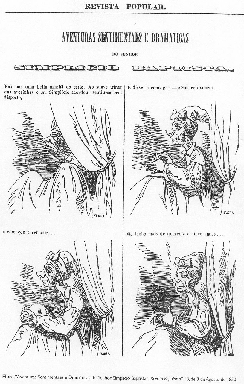 As Aventuras Sentimentaes e Dramáticas do Senhor Simplício Baptista, a primeira banda desenhada portuguesa